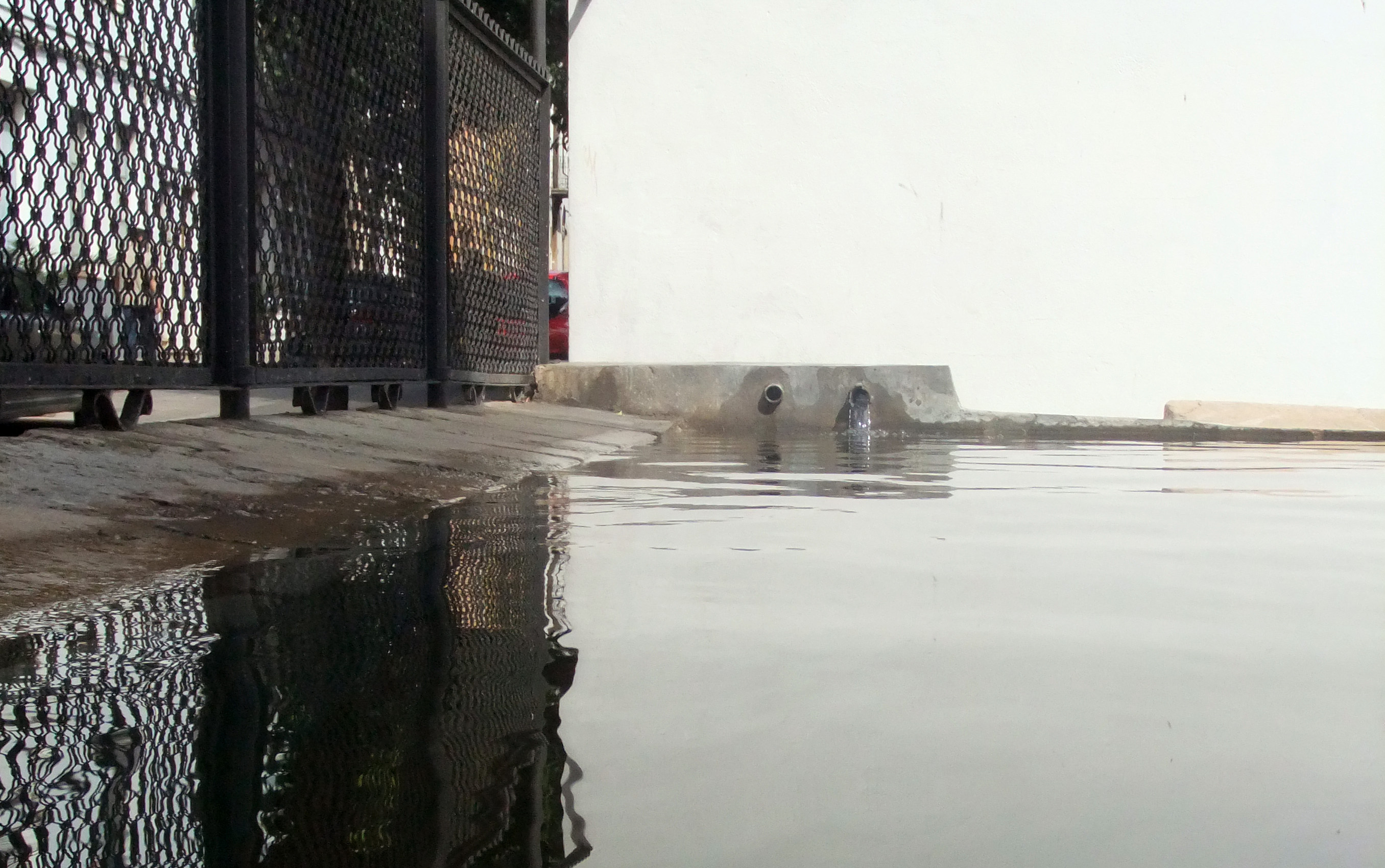 Safareigs públics (Palafrugell)